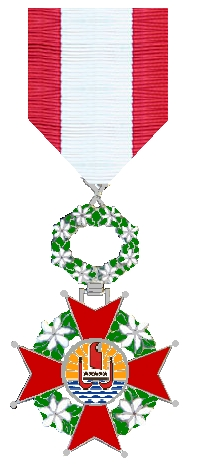 Eigen tekening